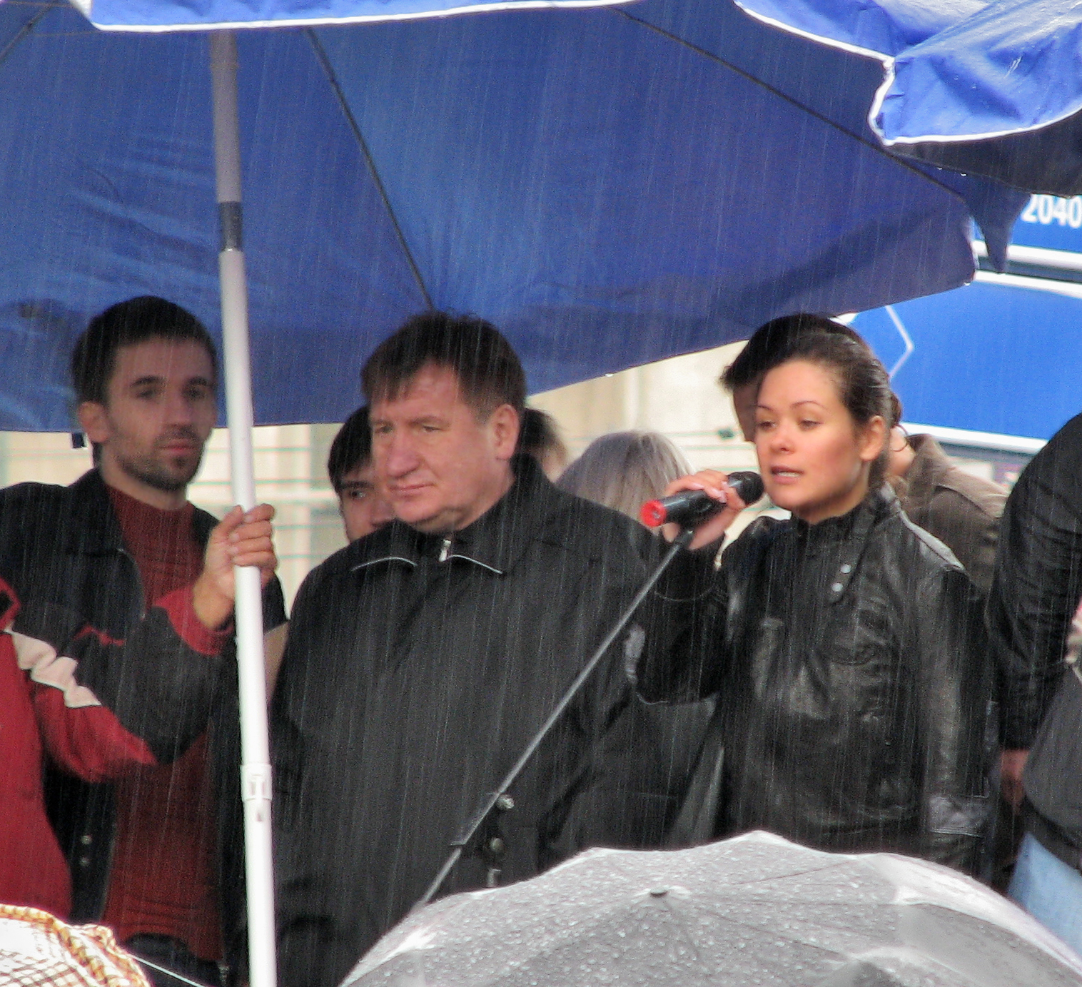 Мария Гайдар на трибуне массового митинга памяти Анны Политковской 7 октября 2007 года в Москве. Этот файл — часть фоторепортажа с митинга.